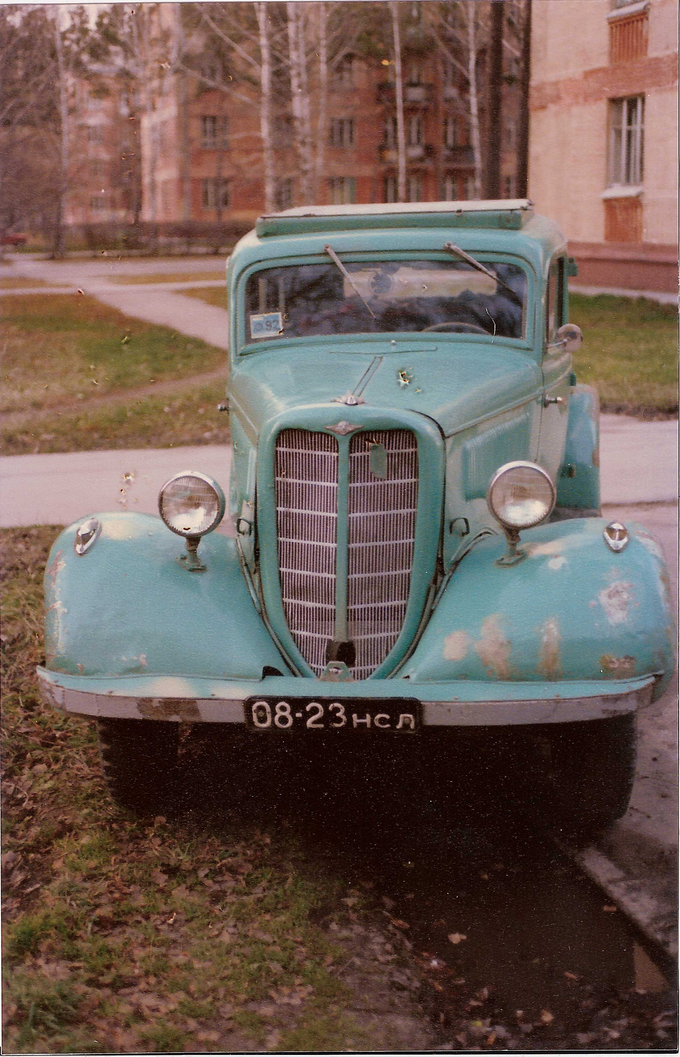 J'ai pris cette photo en 1990 à Novosibirsk. Il s'agit d'une GAZ-M1